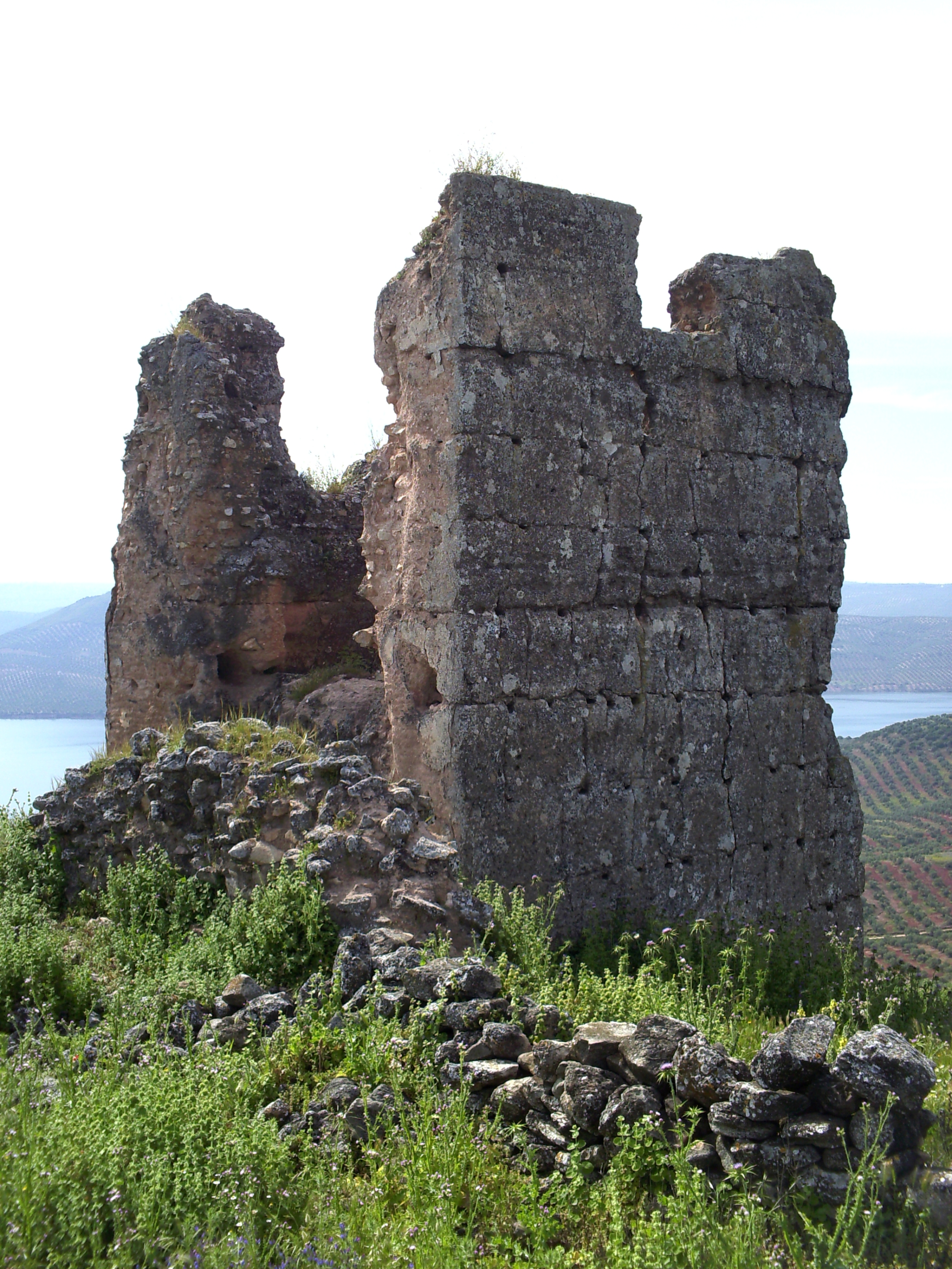 Castillo de Giribaile, en Vilches. Torre oriental.